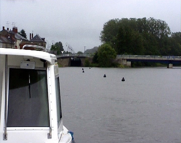 Cercy-la-Tour / Frankreich, Département Nièvre. Rechts der Fluss Aron, links Schleuseneinfahrt in den Canal du Nivernais.